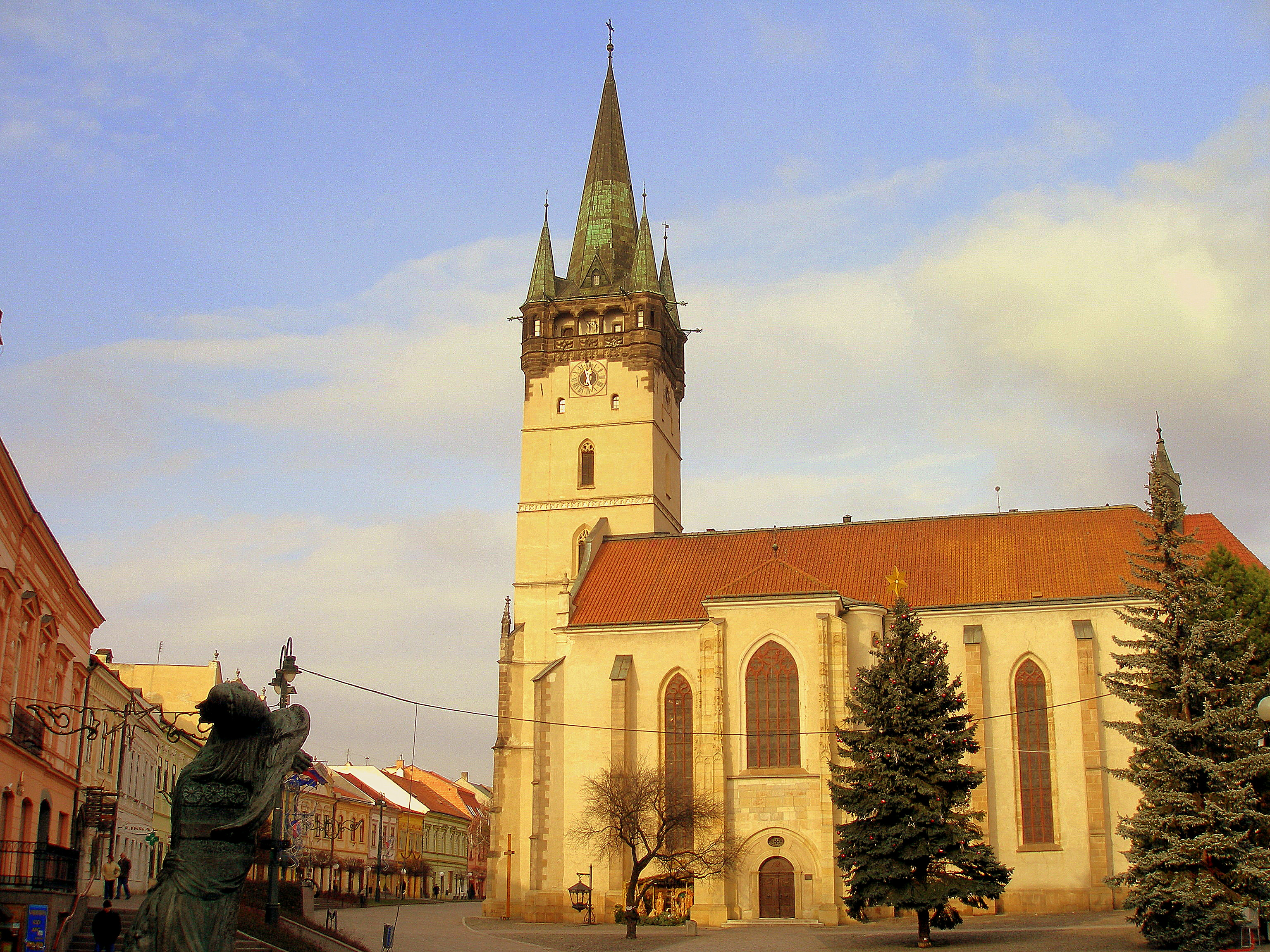 Konkatedrála Dóm Sv. Mikuláša v meste Prešov.Slovensko.